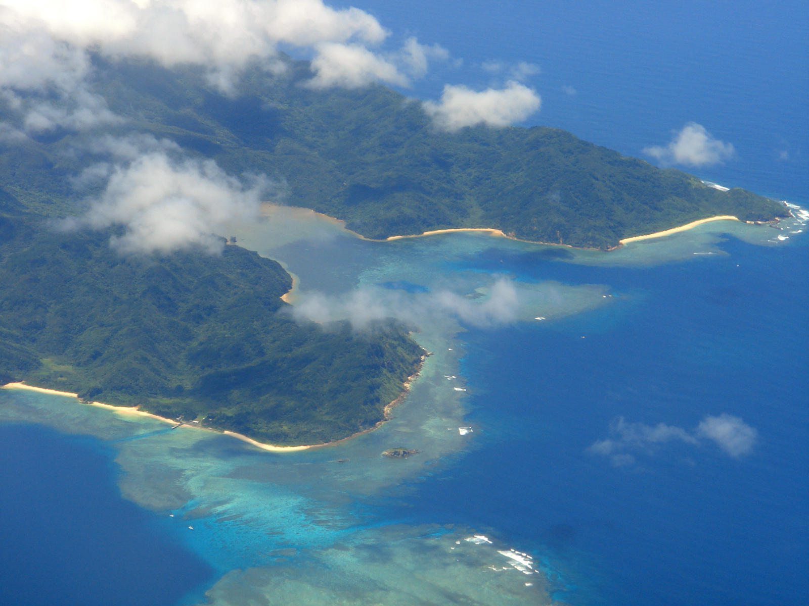 崎山湾（沖縄県八重山郡竹富町/西表島）